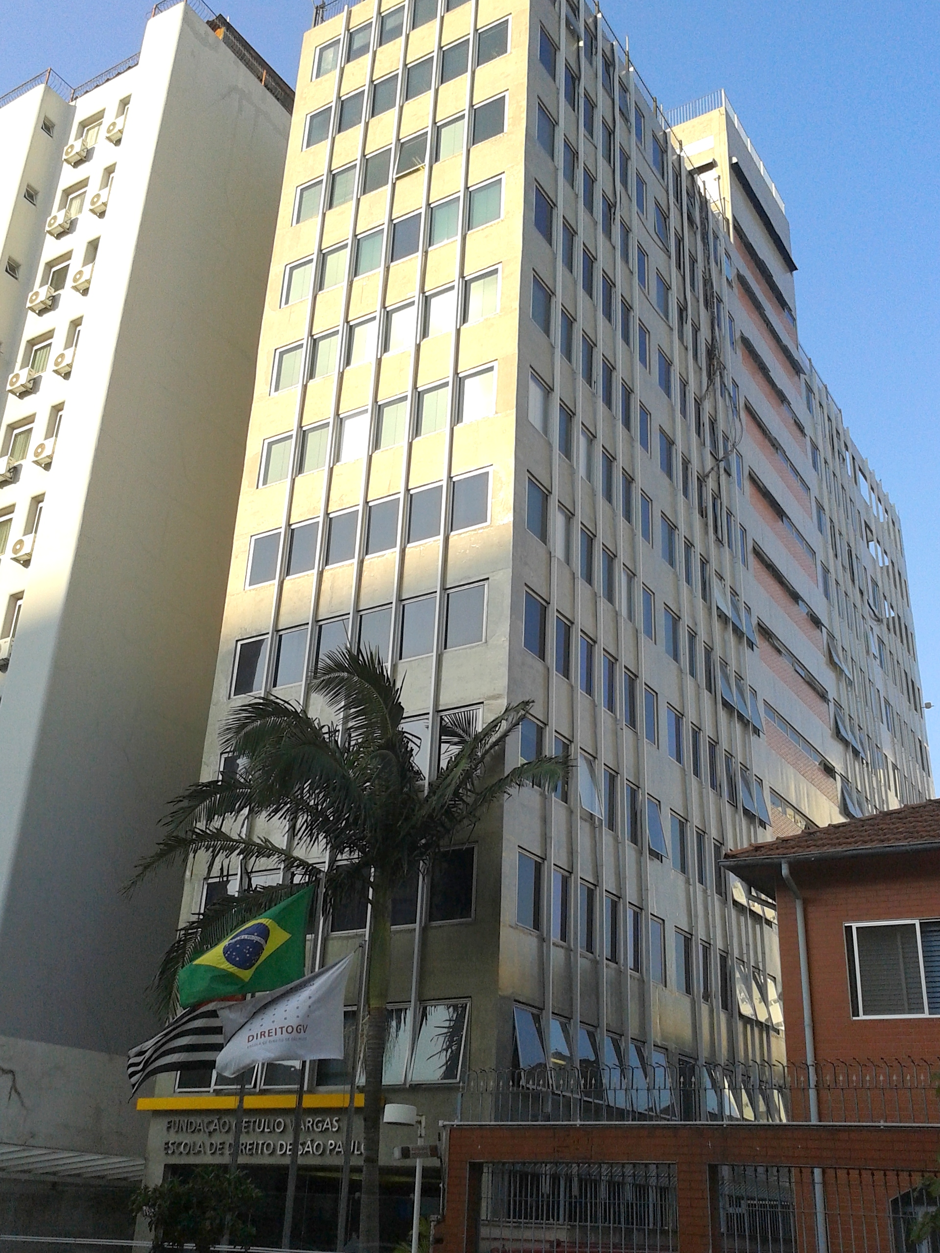 Escola da Direito da Fundação Getúlio Vargas (FGV), na Rua Rocha, distrito da Bela Vista, São Paulo.